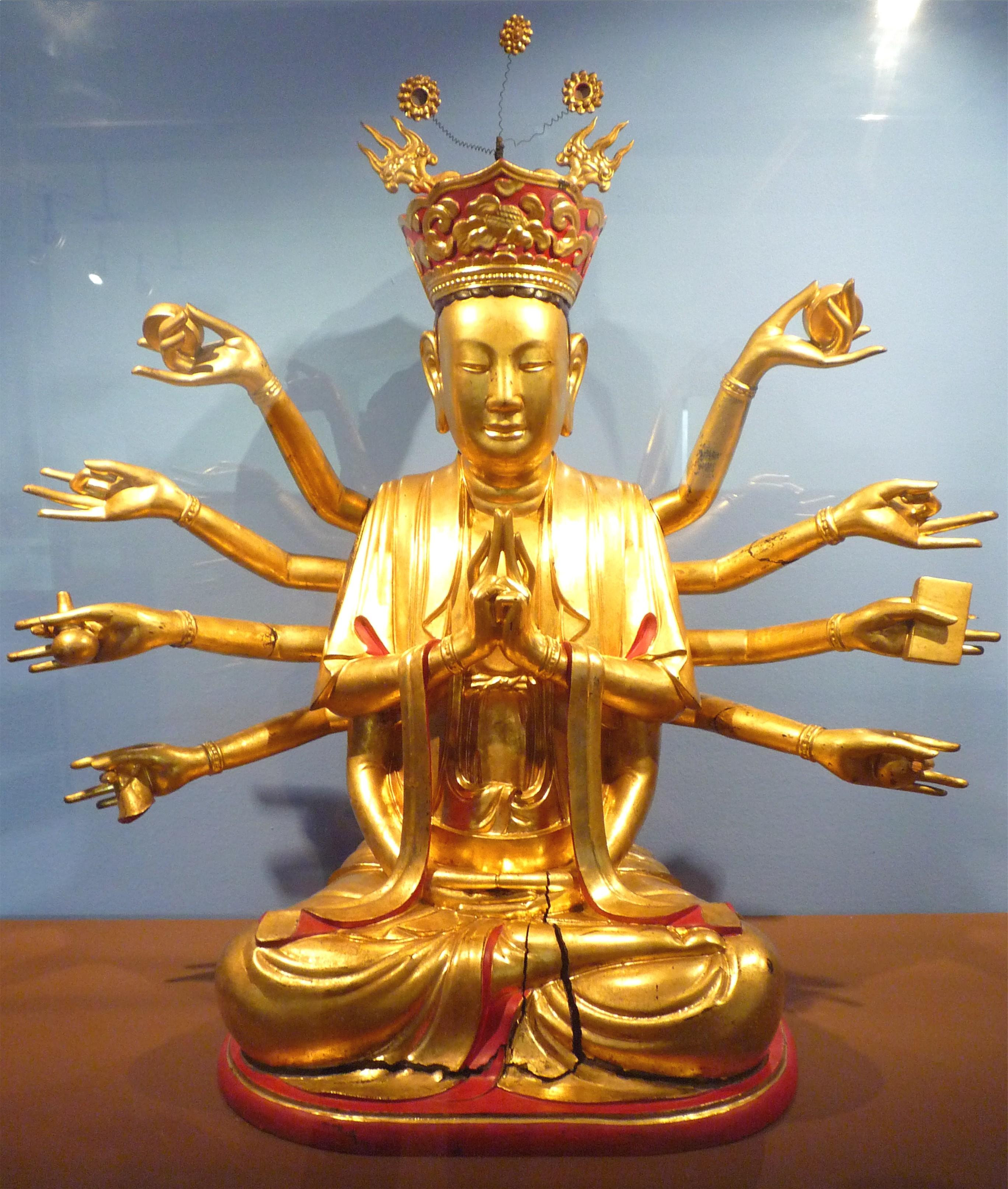 Déesse de la compassion Quan Thé Am à douze bras - Hanoï (Vietnam), bois peint laqué et doré. Don du général Léon de Beylié en 1890 au musée de Grenoble.